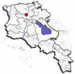 Summary Made using Aramgutang's template. Licensing 08:12, 9 January 2006 Hakob 150x148 (14492 bytes) (Made using Aramgutang's template.)